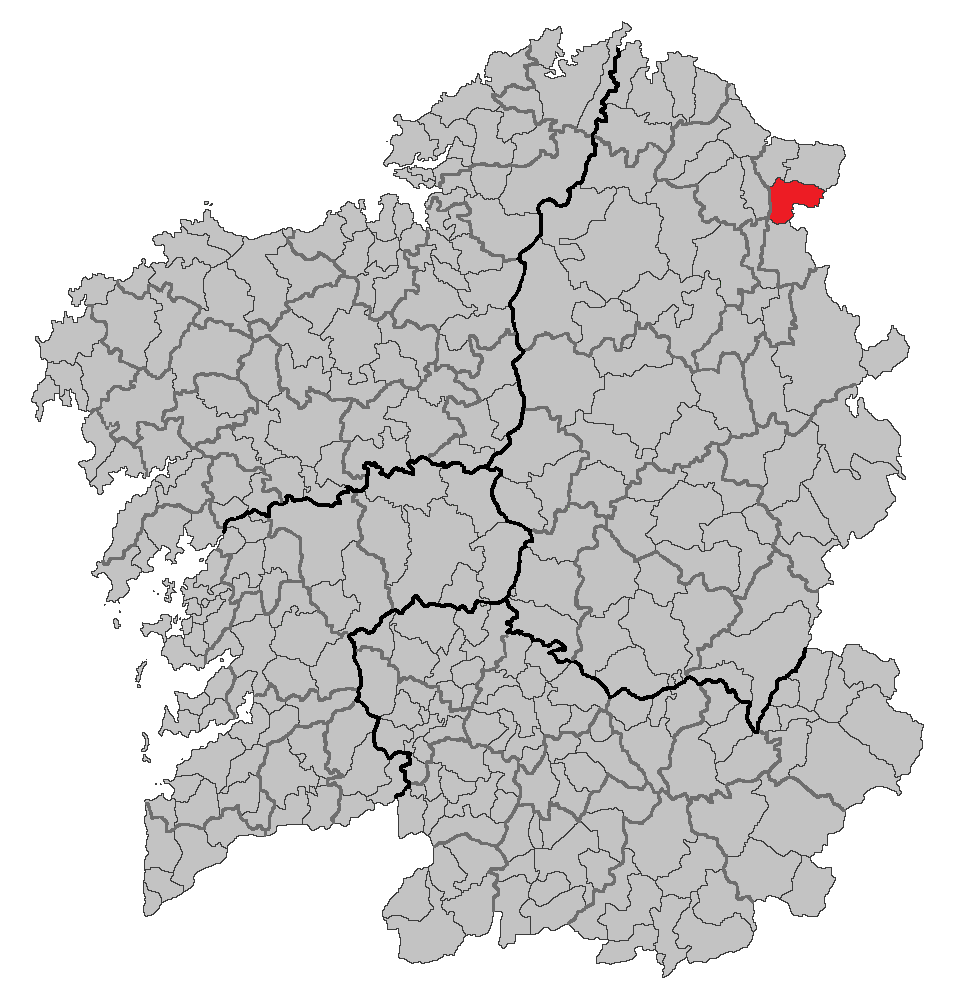 Mapa coa localización do concello de Trabada.